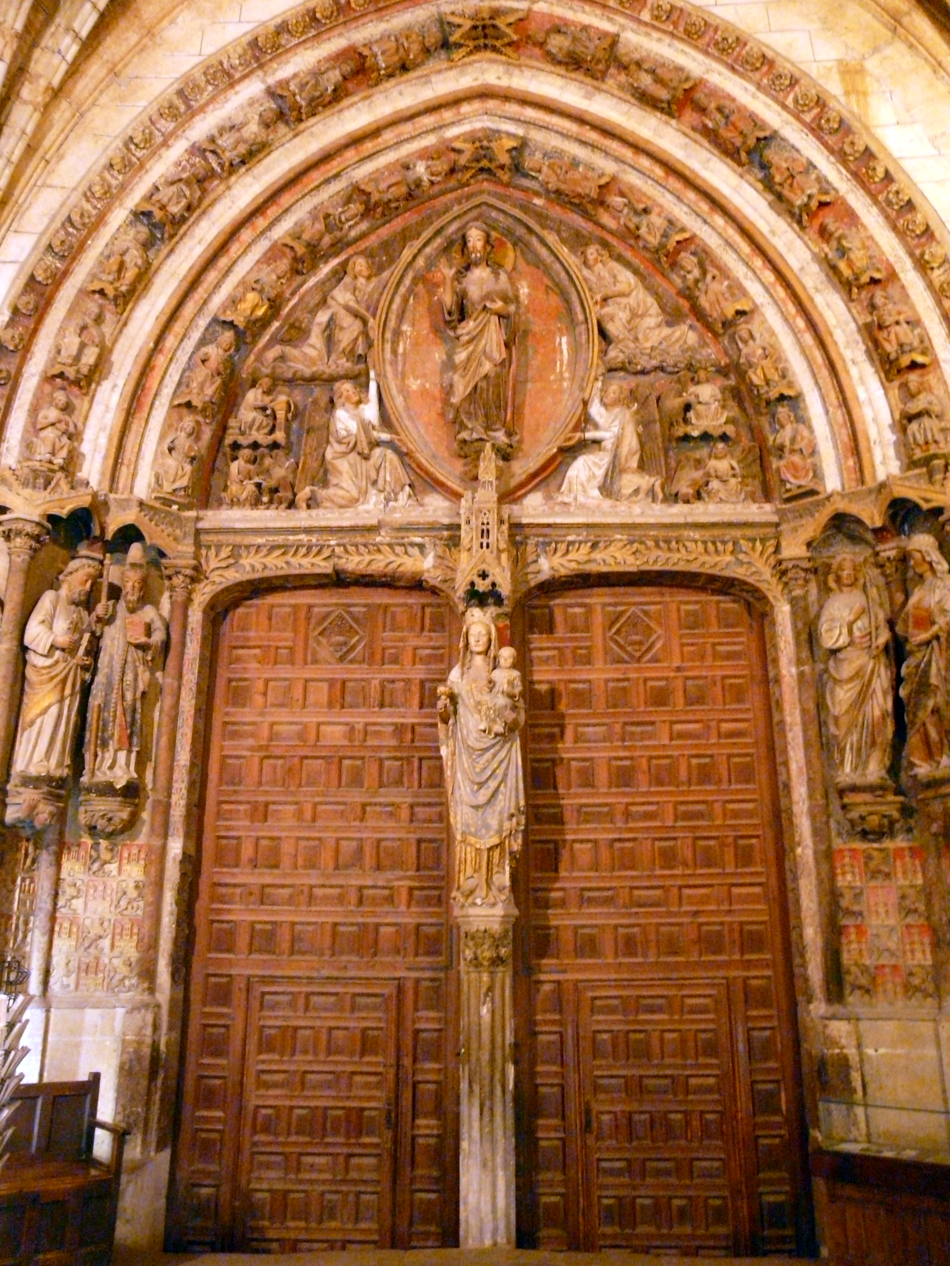 Pórtico central de la fachada norte